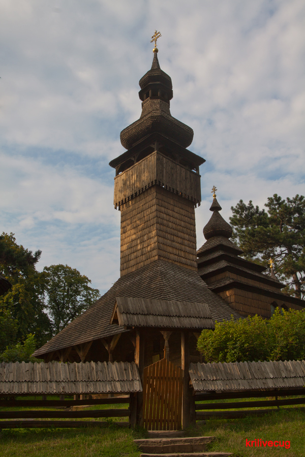 Дерев'яна церква з села Шелестово. Мукачівського району. Храм Святого Мтхайла 1777 рік